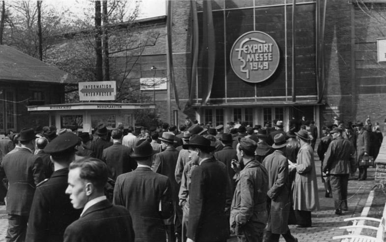 Hannover, Eingang zur Exportmesse Exportmesse in Hannover eröffnet Am 22-4-49 wurde in Hannover die dritte Exportmesse eröffnet. Auf rund 68.000 qm Fläche haben etwa 2.600 Firmen ausgestellt. Zum ersten Mal sind auch Aussteller aus der französischen Zone vertreten. Unser Bild zeigt die ersten Besucher, die durch die soeben geöffneten Tore strömen. 23-4-49 Illus-dpd 3131-49